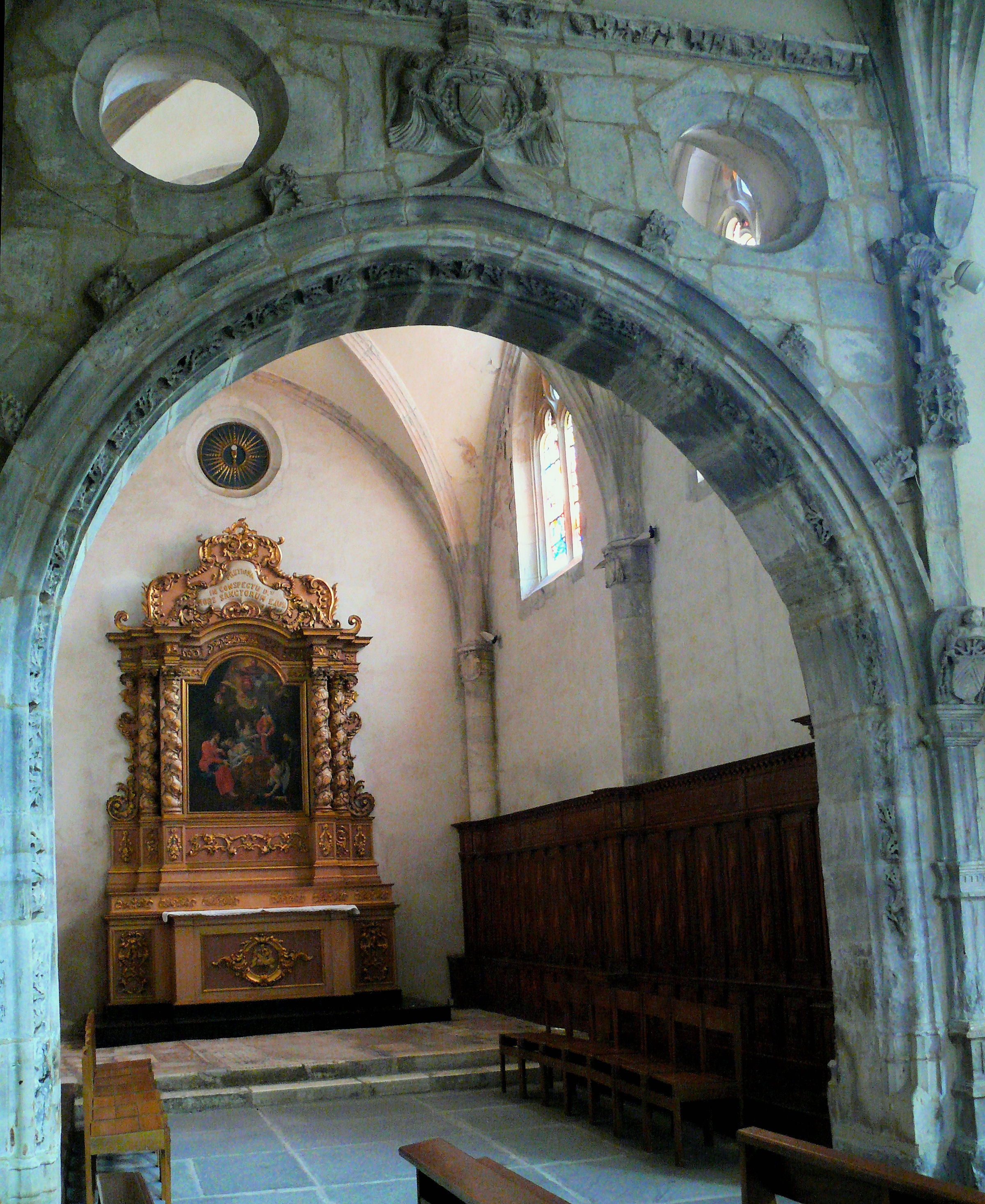 Cathédrale Saint-Jean-Baptiste de Saint-Jean-de-Maurienne - Chapelle Saint-Joseph